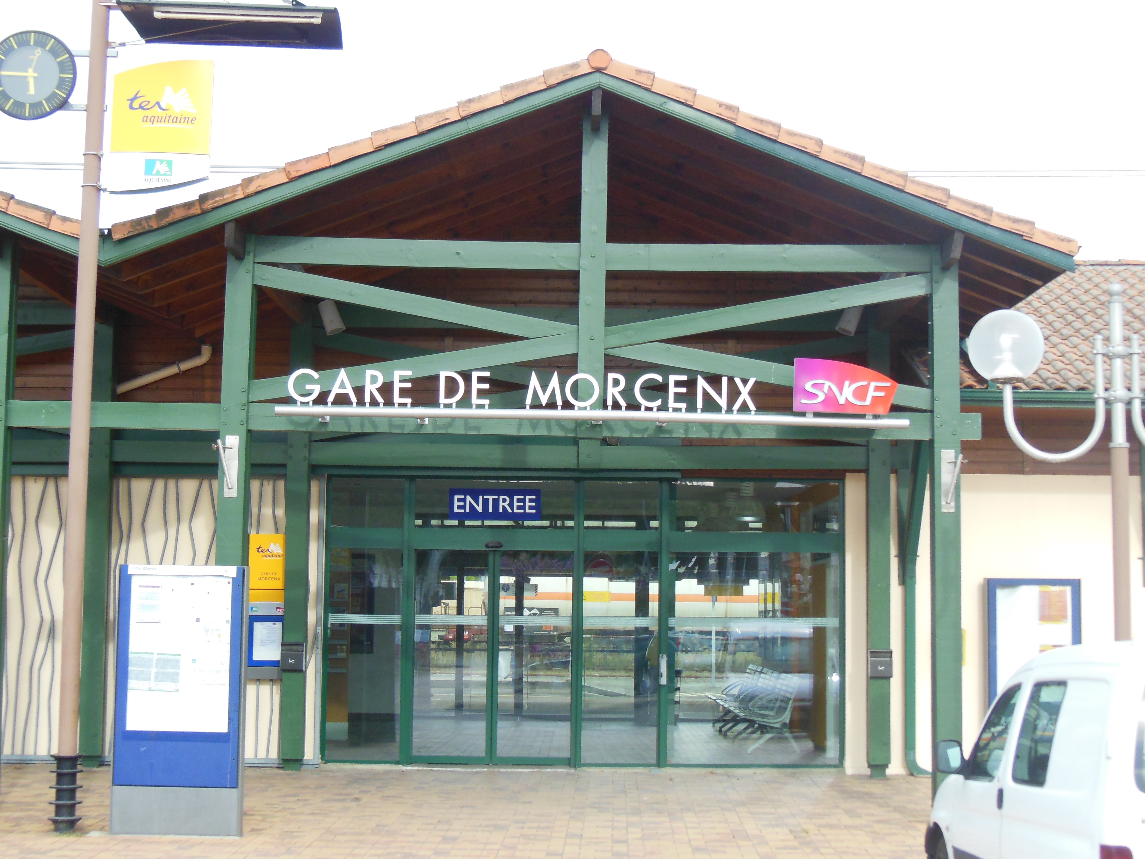 Gare de Morcenx, dans le département français des Landes